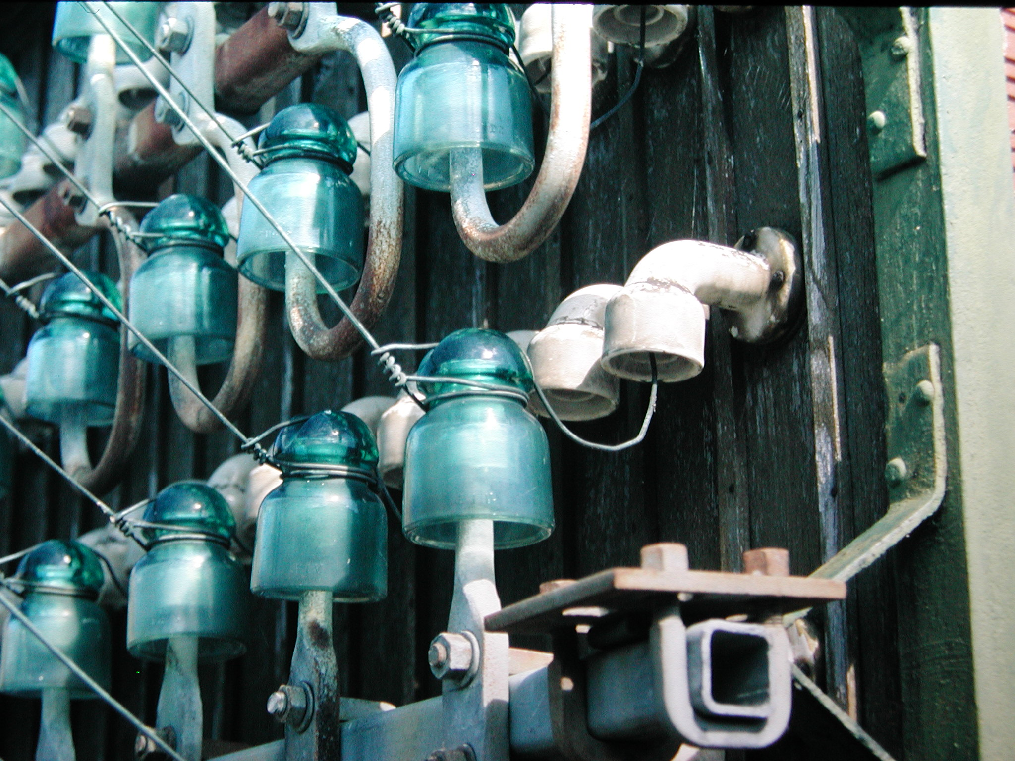 Isolator